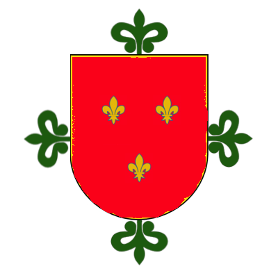 Armas de Zaforteza con cruz de Alcántara